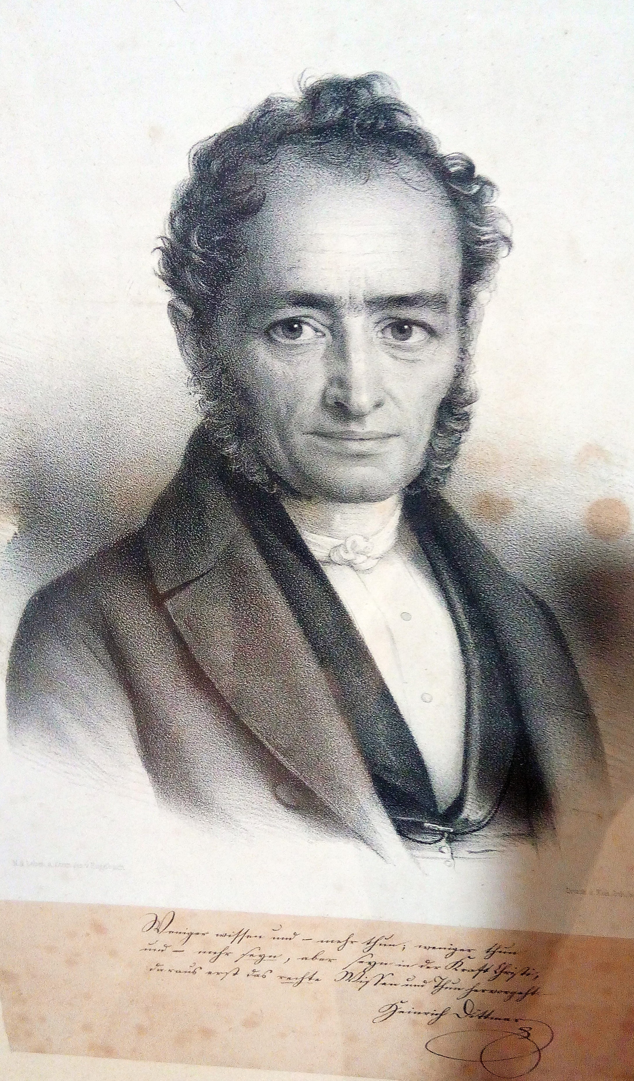 Heinrich Dittmar, deutscher Pädagoge (1792-1866)